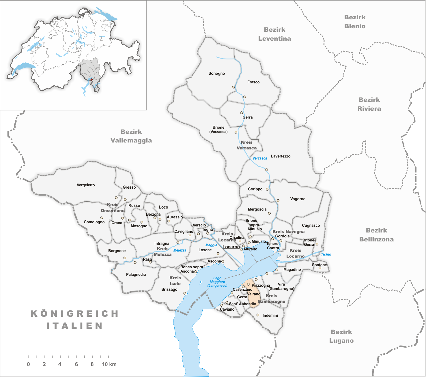 Municipality Vairano